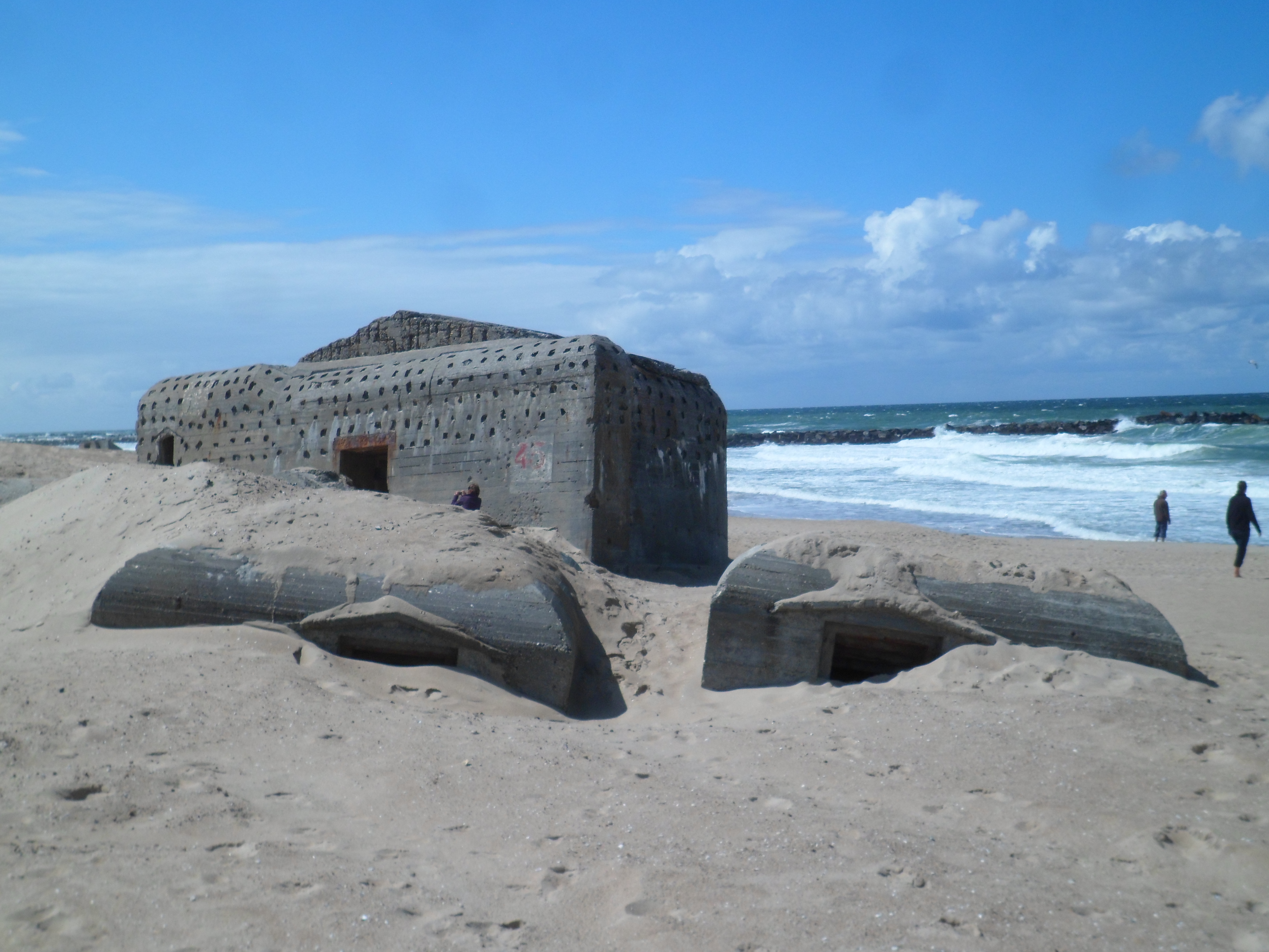 Bunker verschoben